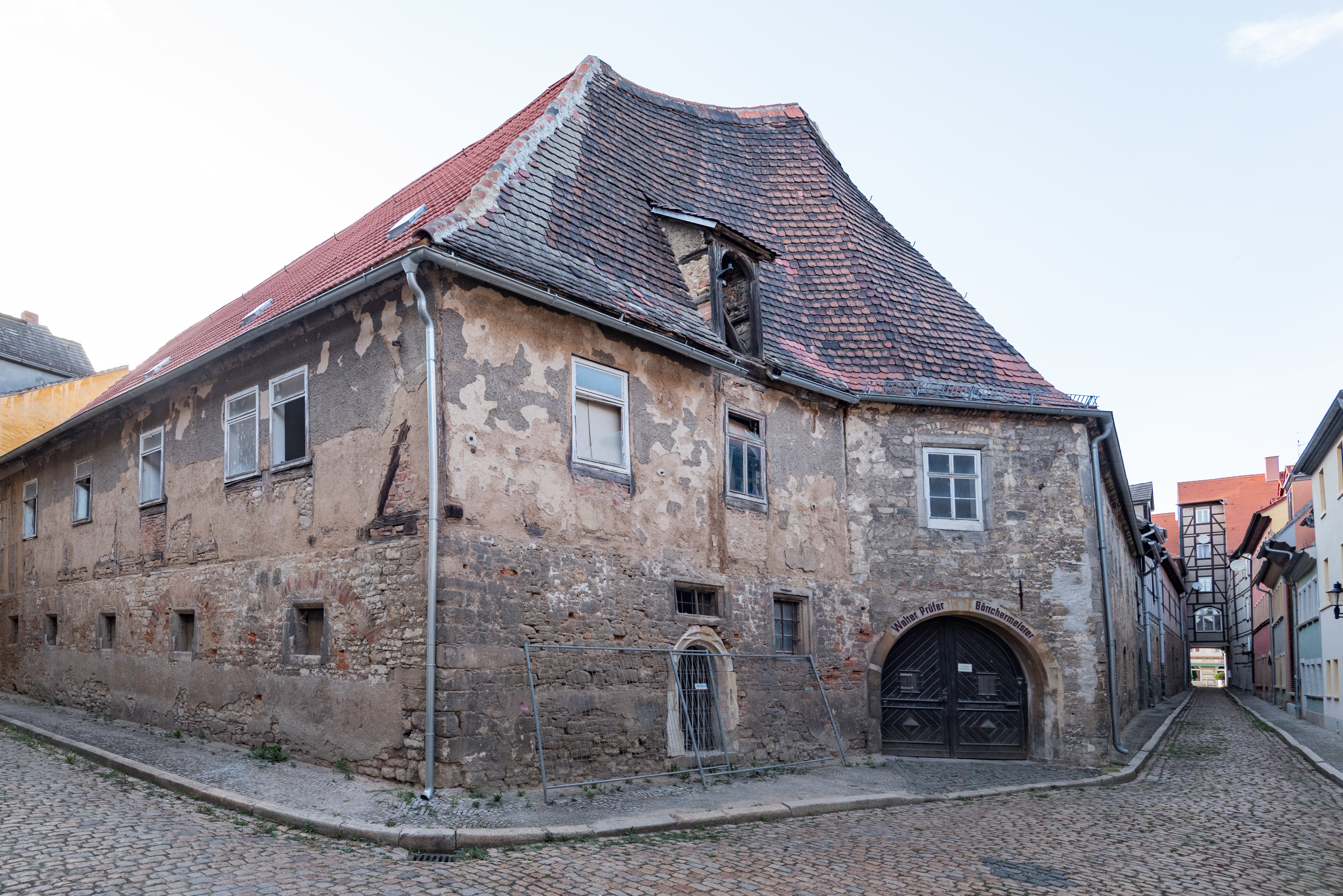 Naumburg (Saale), Jüdengasse 8